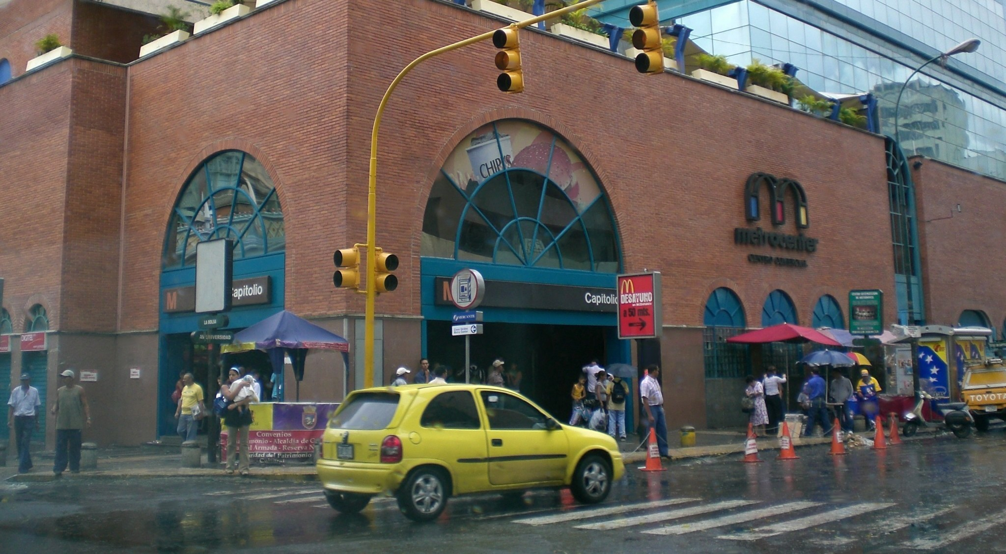 Capitolio Station, Caracas Metro